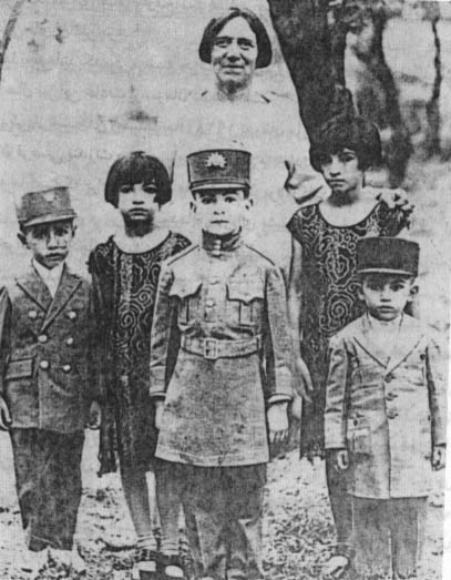 عکس در مجله خواندنیها